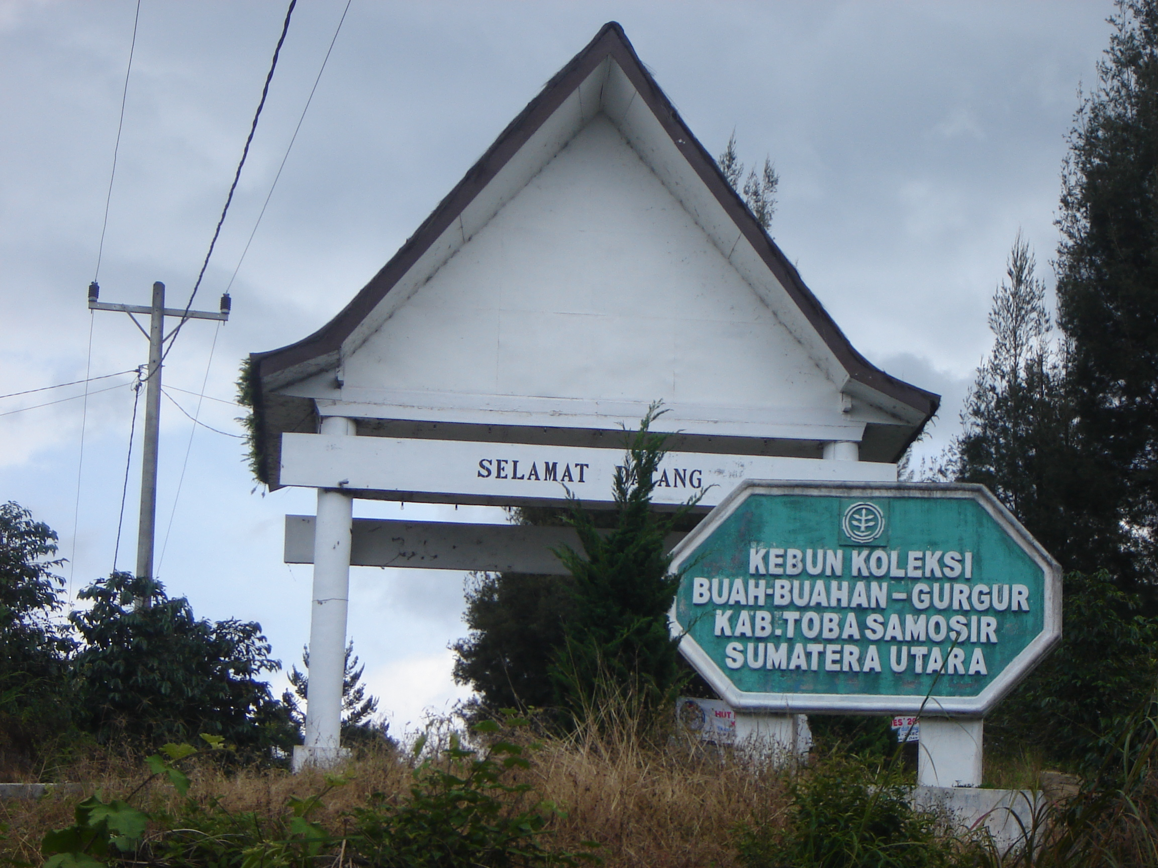 KP Gurgur BPTP SUMUT Luas 54 Ha